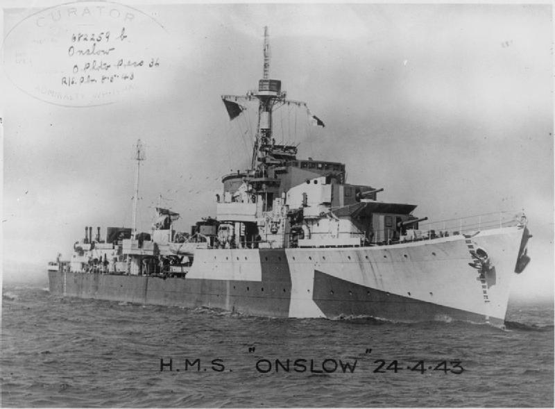 British destroyer HMS ONSLOW underway.